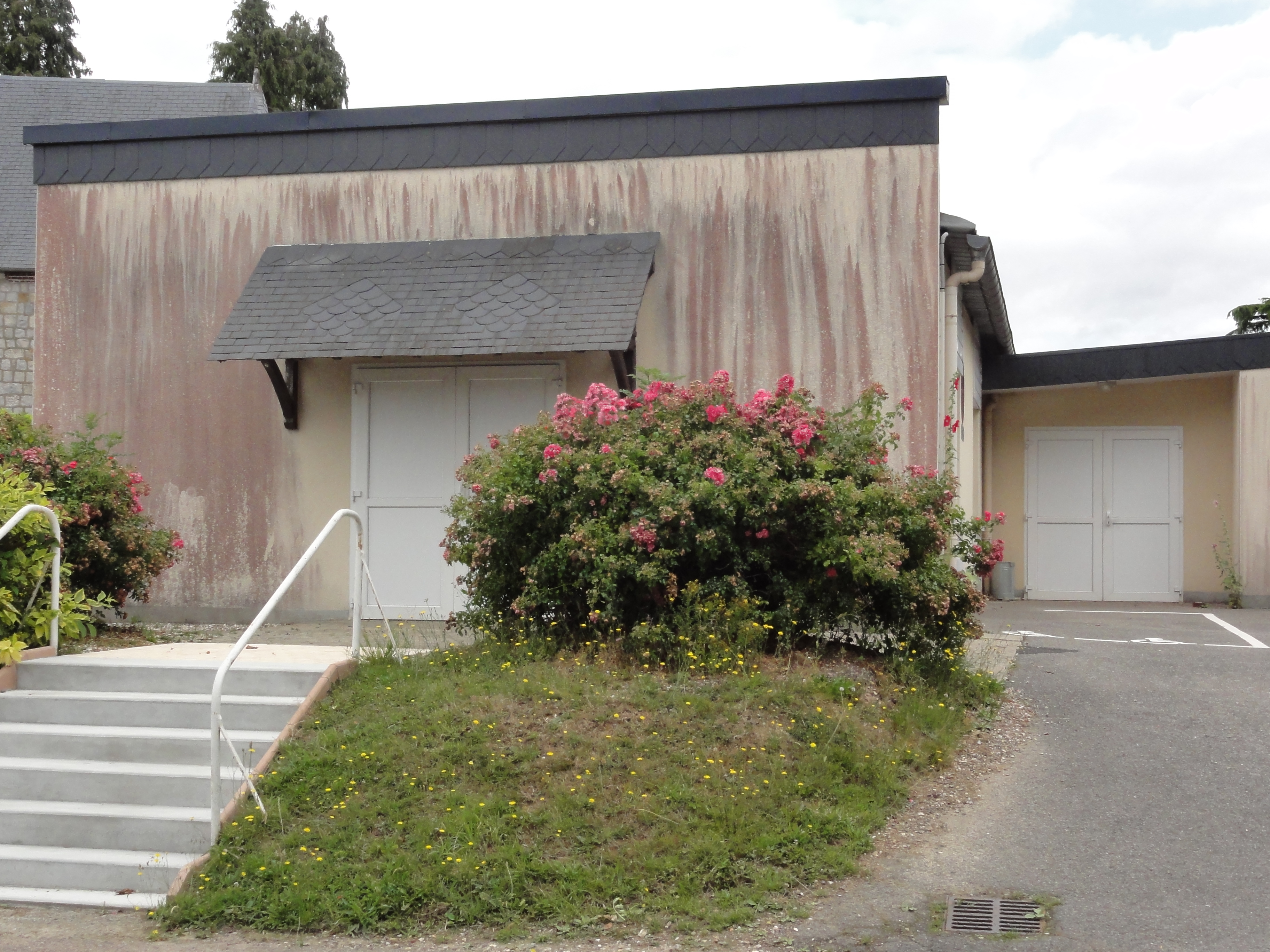 Bénesville (Seine-Mar.) salle polyvalente